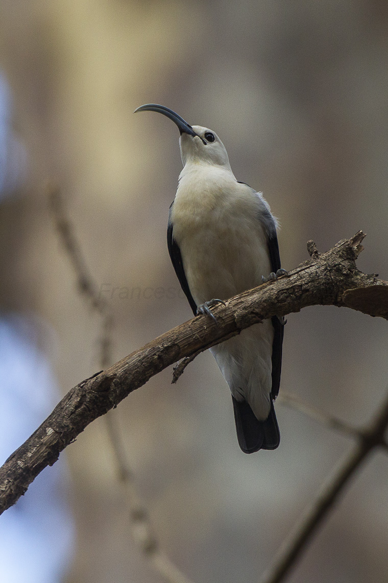 Sickle-billed Vanga - Ankarafantsika - Madagascar